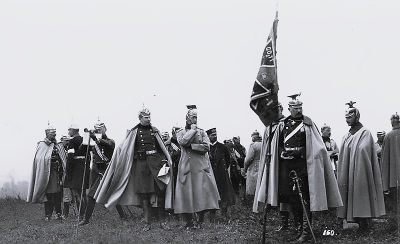 Kaisermanöver 1908 Elsaß-Lothringen Ganz links der Kaiser [Wilhelm II.], dann Prinz August Wilhelm, der Kronprinz (1. bayerischen Ulanen) [Wilhelm von Preußen]